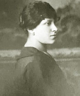 Vecchia foto della supercentenaria italiana Emma Morano. Depicted person: Emma Morano